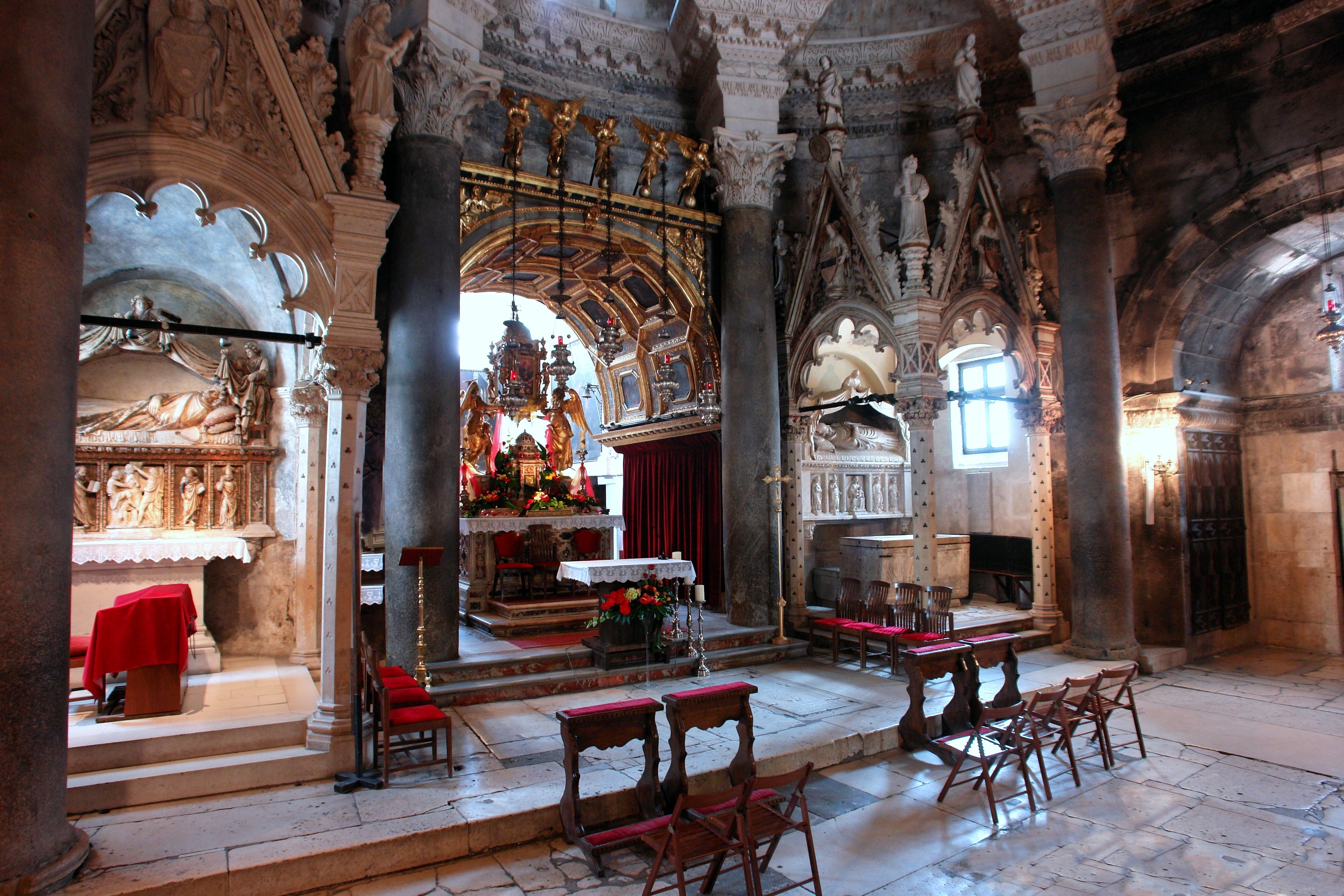 Szent Dujmo-székesegyház, Spalato (Split). Katedrala sv. Dujma u Splitu. Cathedral of Split.